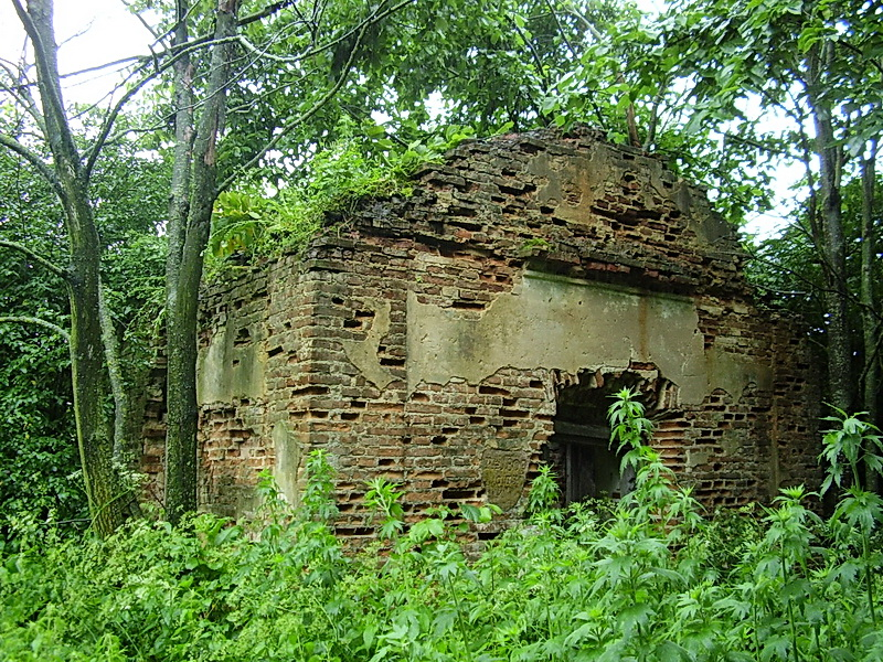 Галынка. Каталіцкая капліца